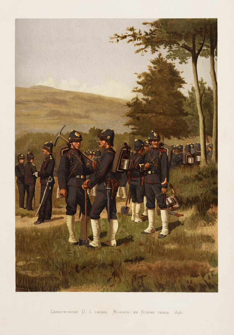 Genietroepen van het Oost Indisch Leger in Marsch- en Klein tenue, 1896.